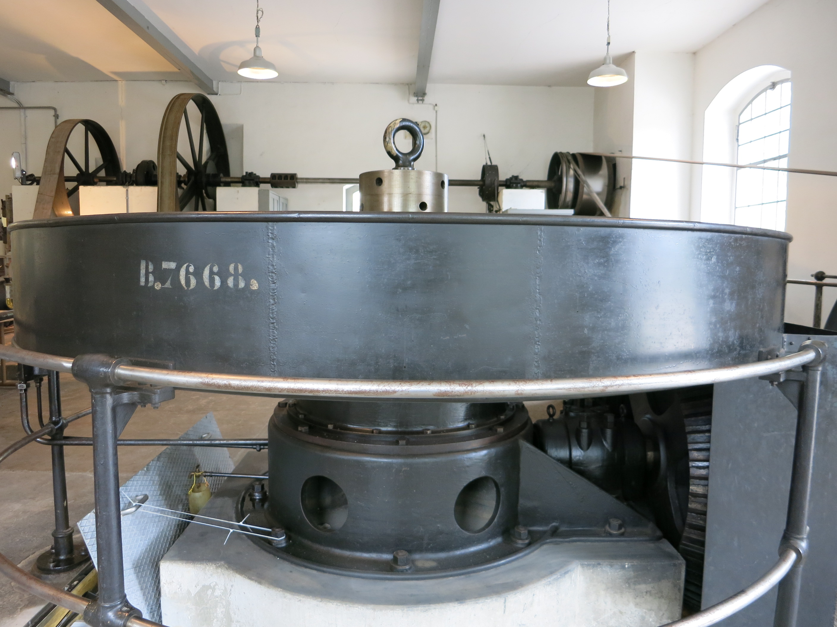 Historisches Kleinkraftwerk Ottenbach ZH, Schweiz